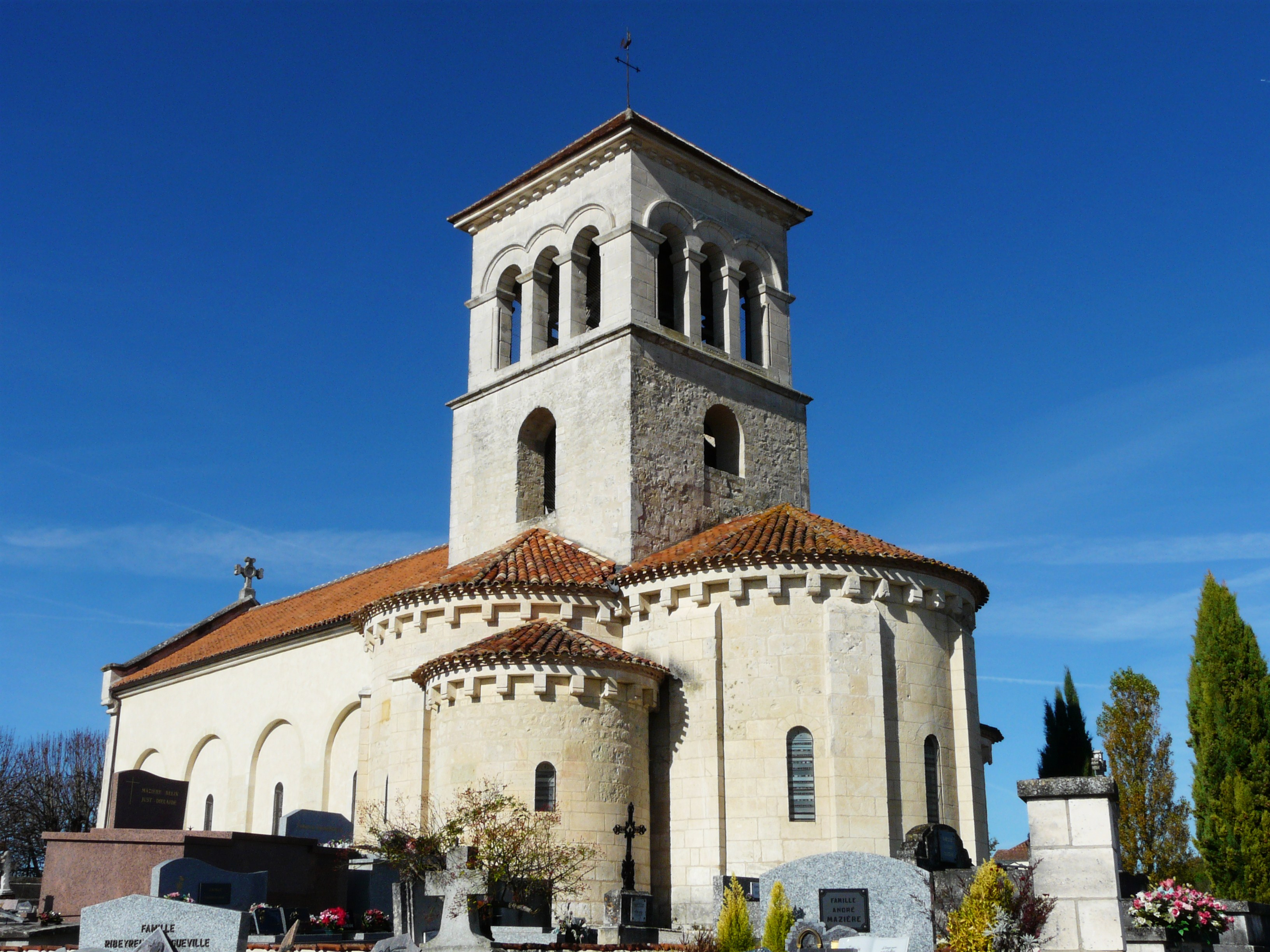 L'église Sainte-Madeleine vue depuis le sud-est, Montagrier, Dordogne, France